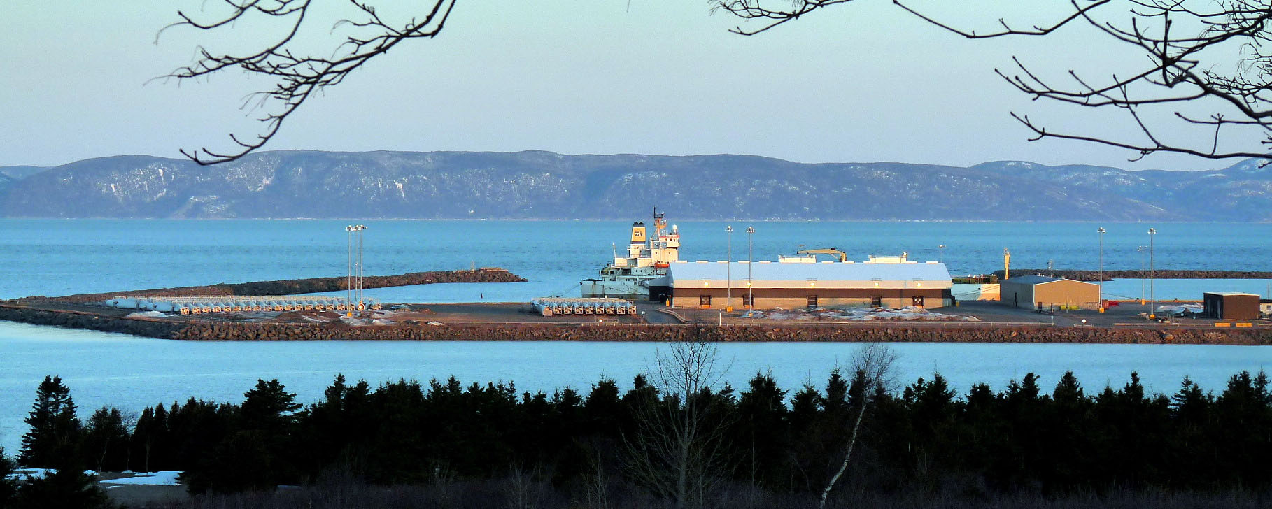 Port de Gros-Cacouna sur le fleuve Saint-Laurent, dans la municipalité de Cacouna, au Québec